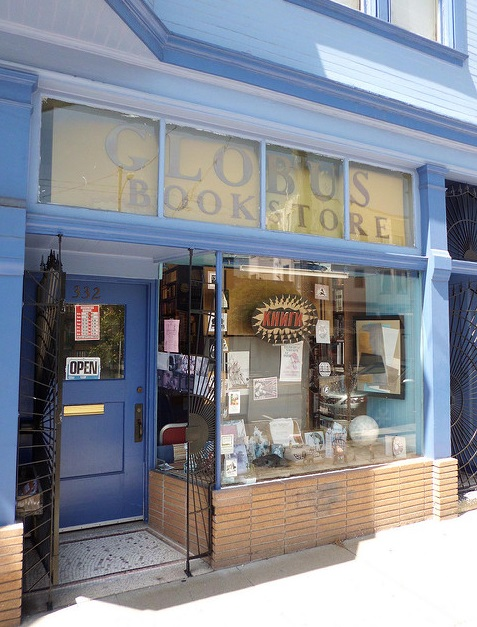 Globus Bookstore